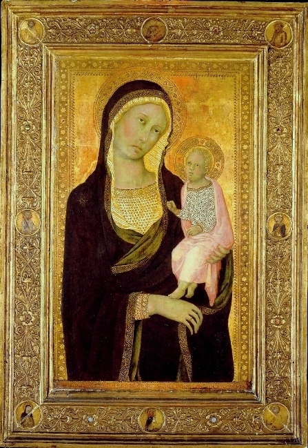 Ceccarelli_Vierge12.jpg